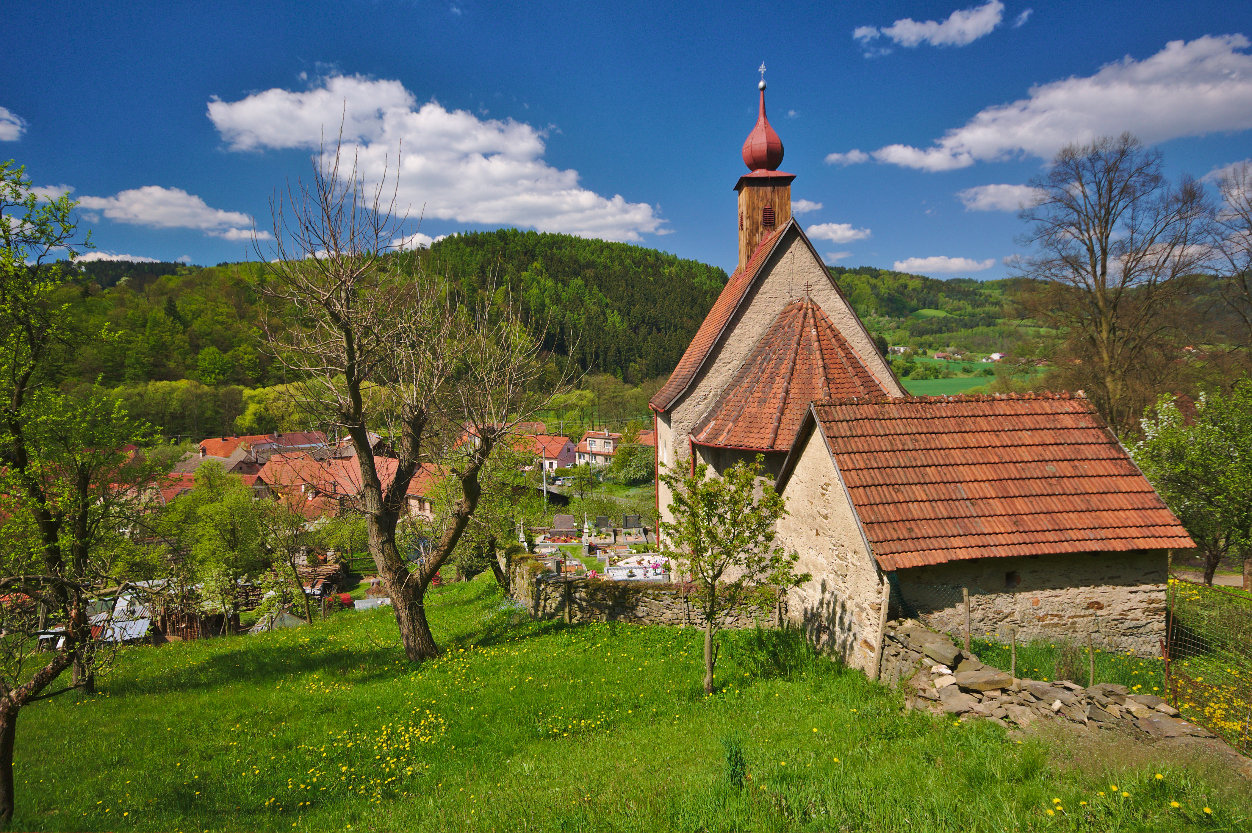 Kostel svatého Václava, Dolní Čepí, Ujčov, okres Žďár nad Sázavou